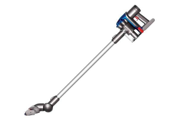 Пылесос_Dyson_DC_35